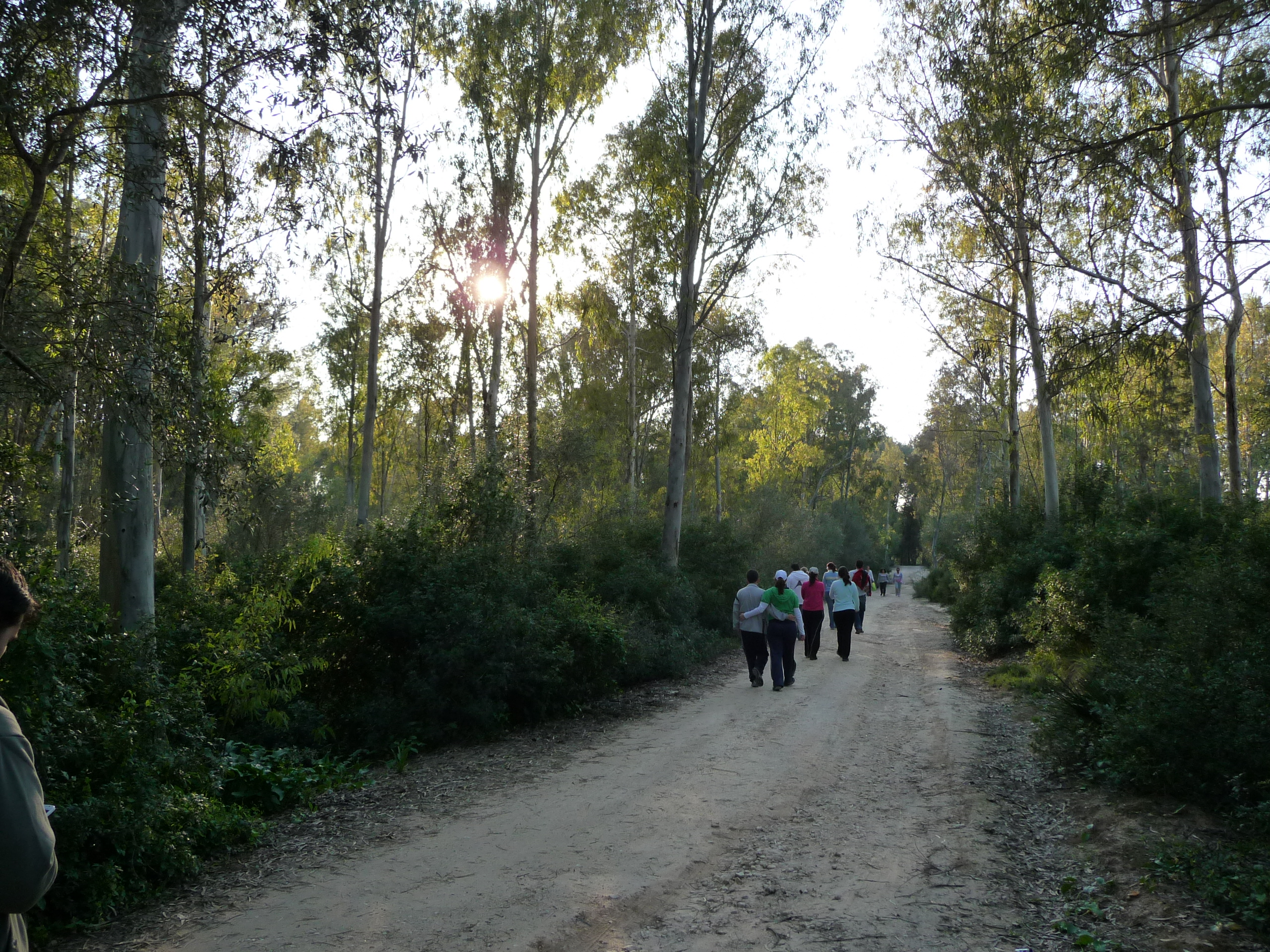 LasAguilillas-EstellaDelMarques-p1010710.jpg